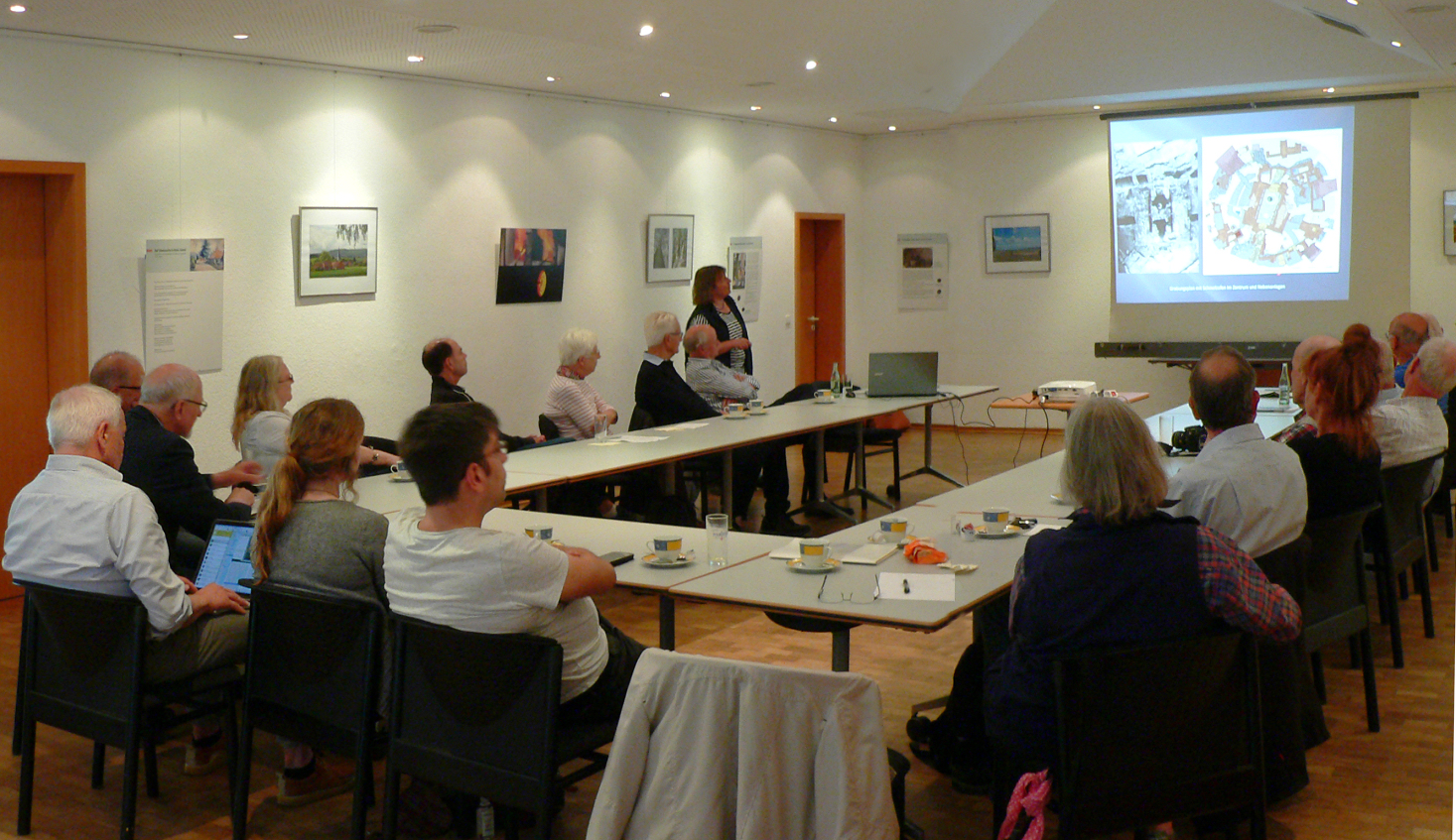 Archäologischer Arbeitskreis Niedersachsen, Treffen in Bad Münder